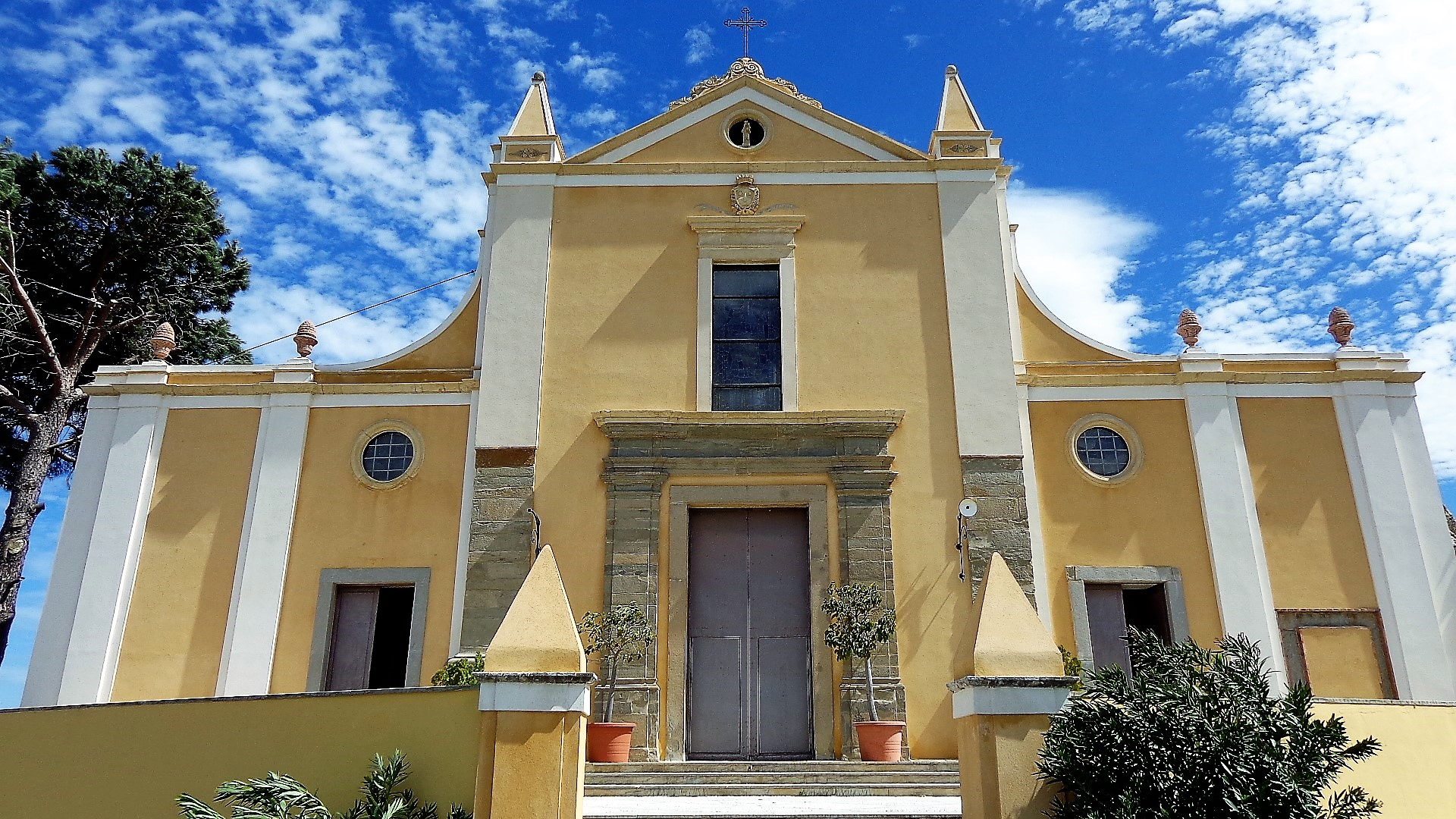 Il nuovo prospetto